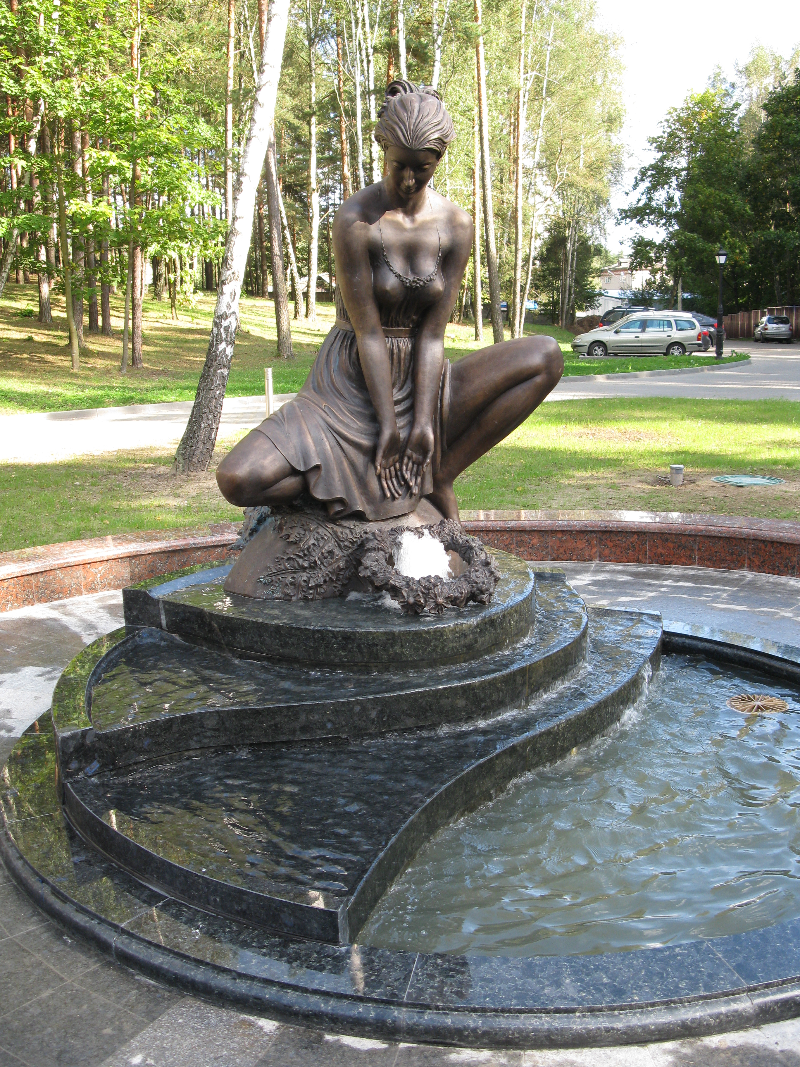 Фонтан "Криница"